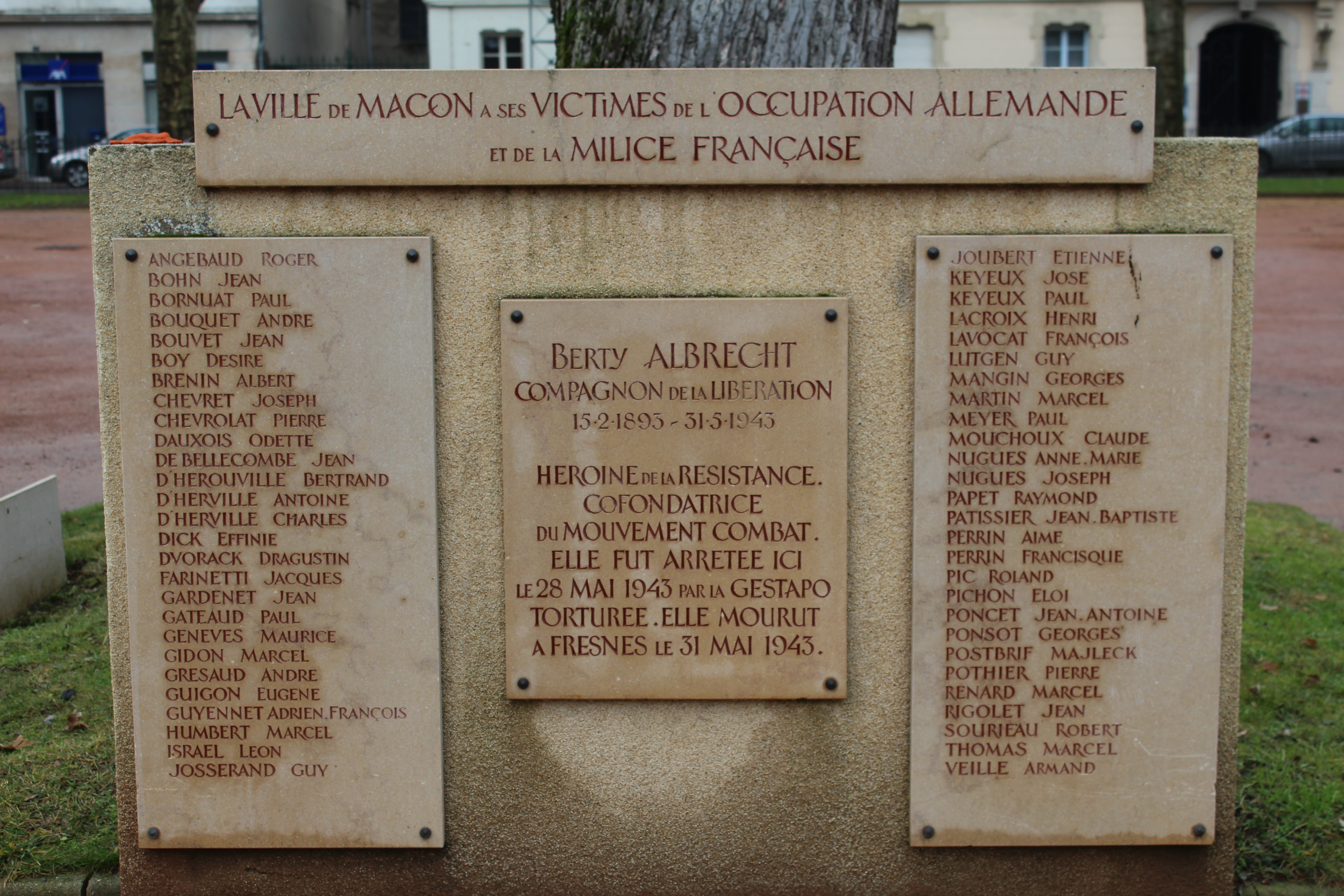 Monument en l'honneur des victimes de l'occupation allemande et de la Milice française dans le square de la Paix de Mâcon.